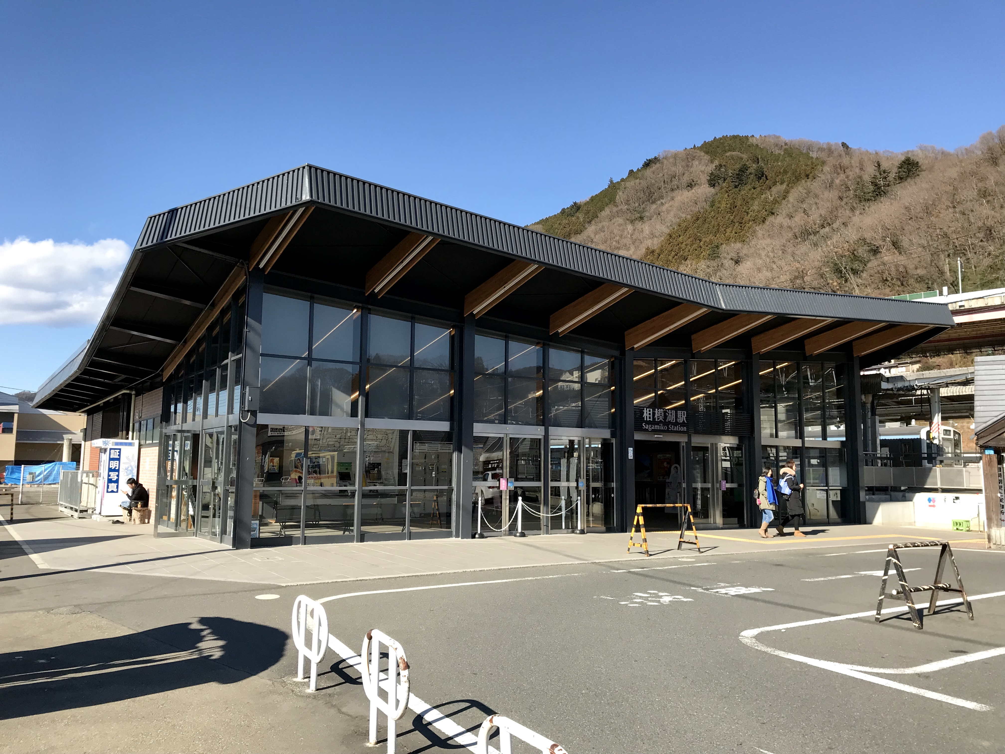 JR東日本中央本線相模湖駅リニューアル後の駅舎